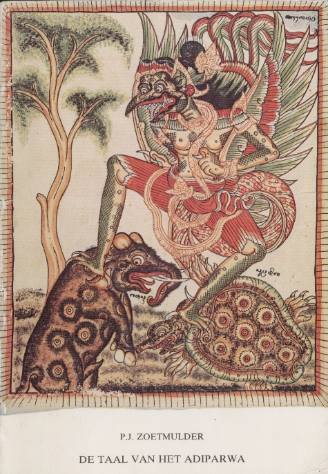 Kaft van Zoetmulder's boek De Taal van het Adiparwa, herdruk uit 1983.